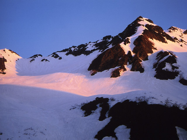 Kitahotakadake (3106m) from Karasawa. 涸沢から撮影した北穂高岳(3106m)